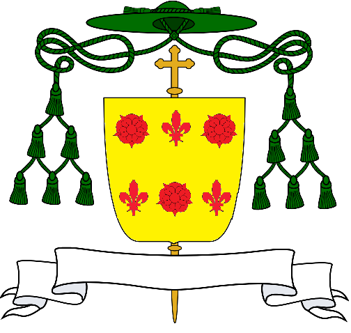 Stemma del vescovo Carlo Ambrogio Mezzabarba